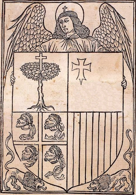 Primer documento del escudo de Aragón (1499) en el Frontispicio de la obra de Fabricio Gualberto Vagad, Crónica de Aragón, Zaragoza, Paulo Hurus, 1499.